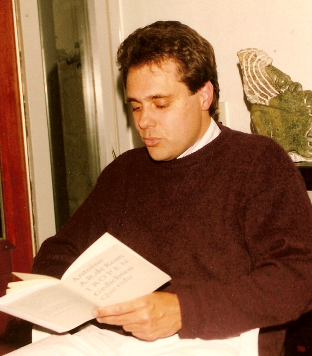 Antoine de Kom. Eigen opname.